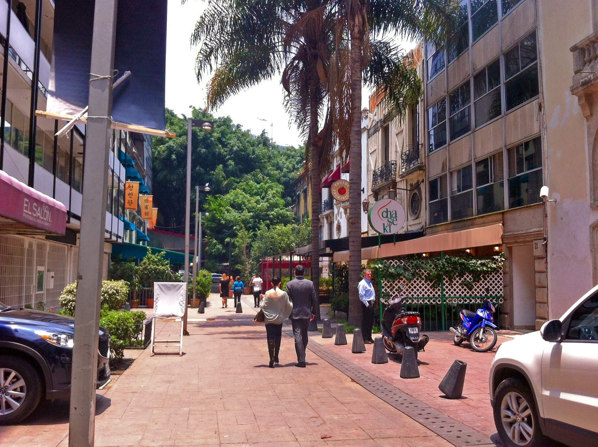 Calle semipeatonal de Copenhague, en la Zona Rosa, Colonia Juárez.